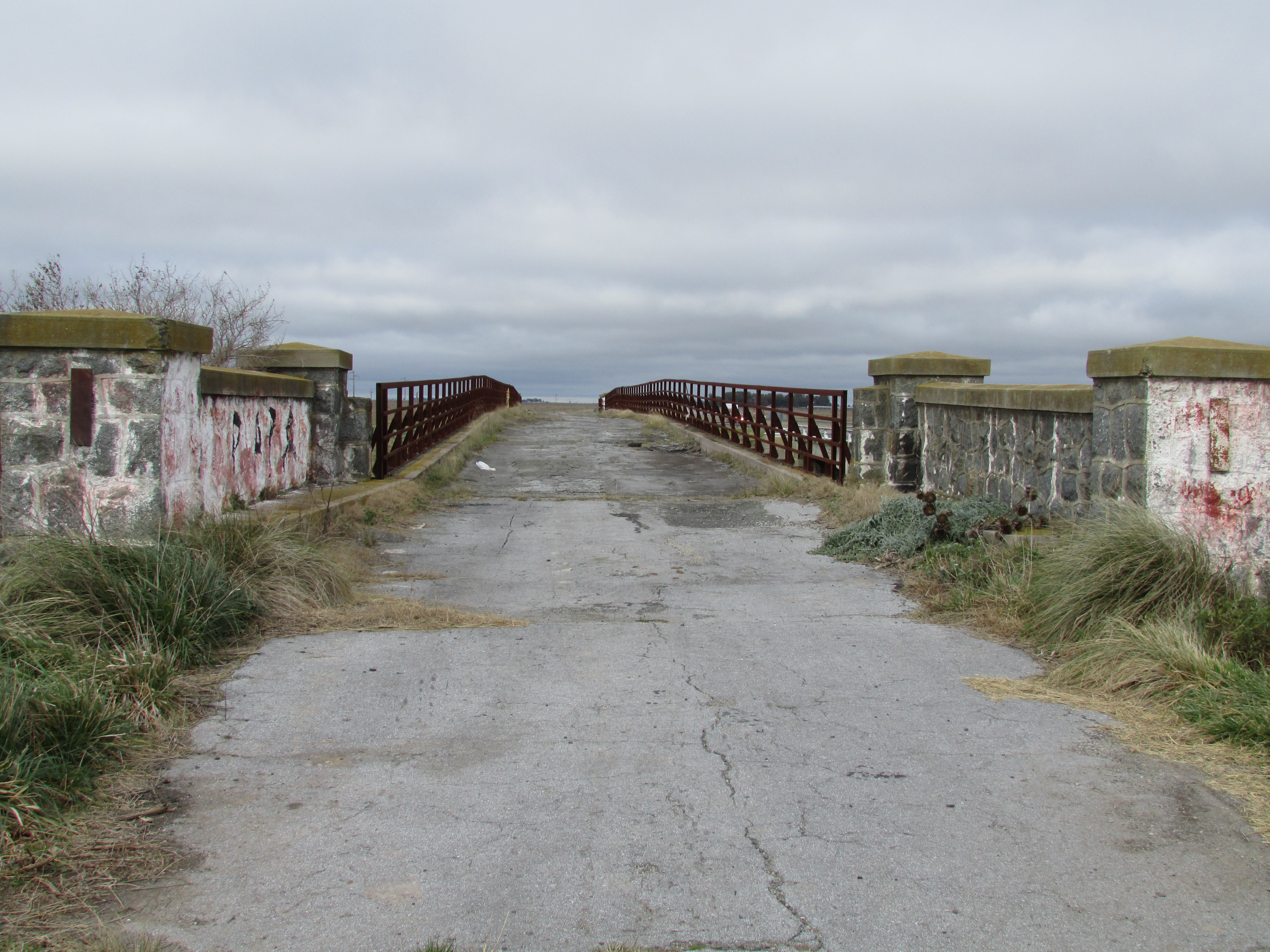 Calzada del antiguo puente de la ruta 2 sobre el canal 1 en el partido de Dolores, provincia de Buenos Aires, Argentina.